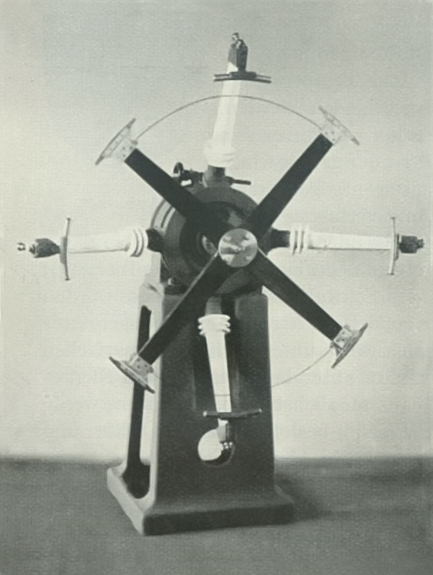 Historischer mechanicher Gleichrichter fuer Hochspannungen. Einsatz: bei Elektrofiltern.